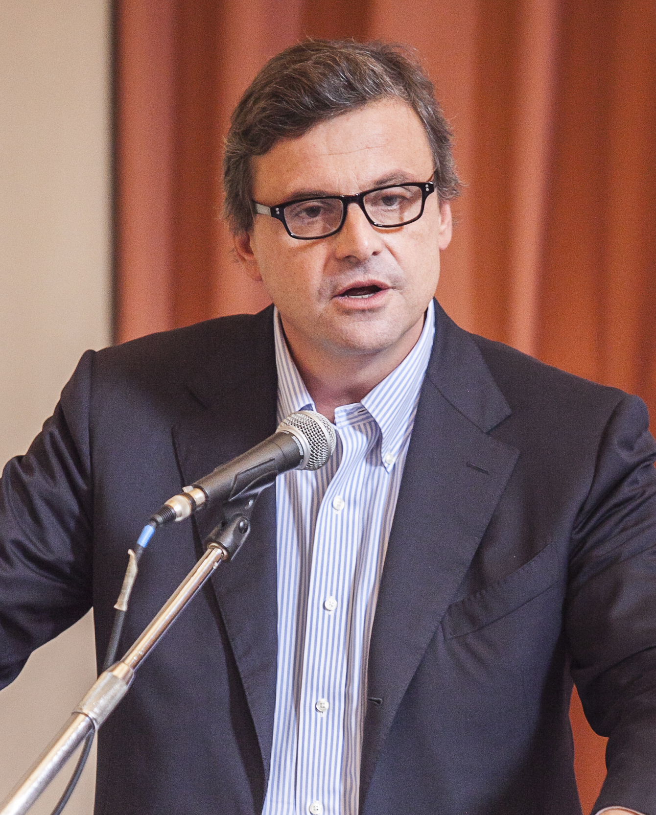 XXVII Pontignano Conference: day 3